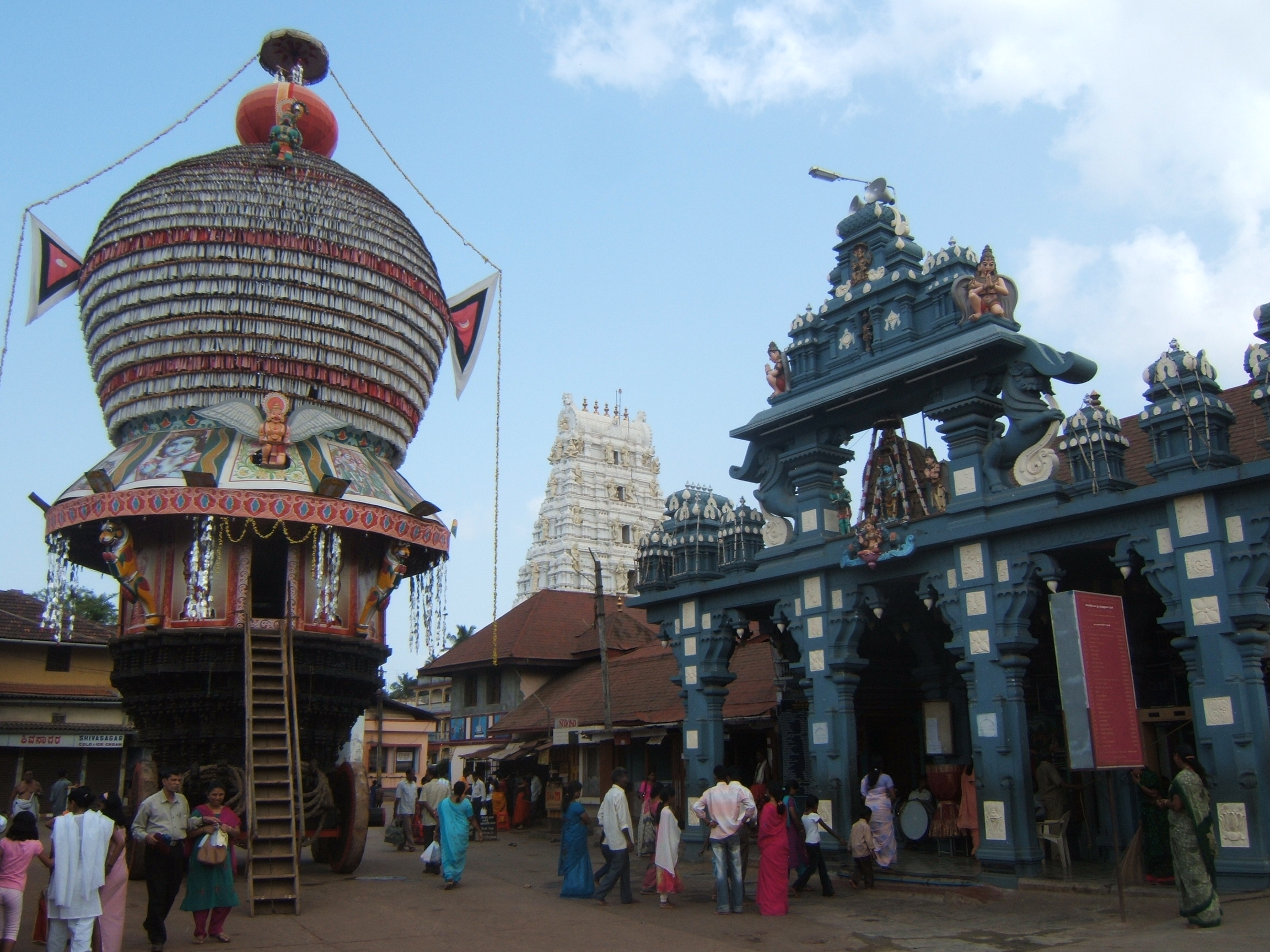 Udupi, Karnataka